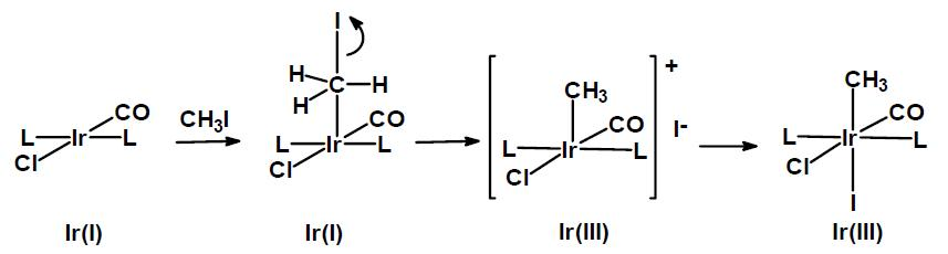 Addicio oxidant (mecanisme SN2)